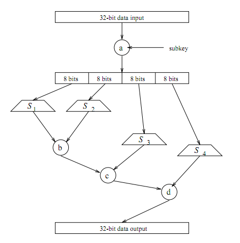 Раундовая функция CAST